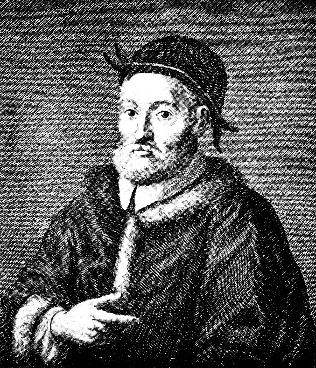 Sujet : Portrait d'Andrea Cesalpino Source : Gravure de 1765 d'après un portrait du muséum du jardin botanique de Pise. Tirée d'Herbals d'Agnes Arber (1912). Image du domaine public. Artiste : Dessin de Giuseppe Zocchi, gravé par F. Allegrini